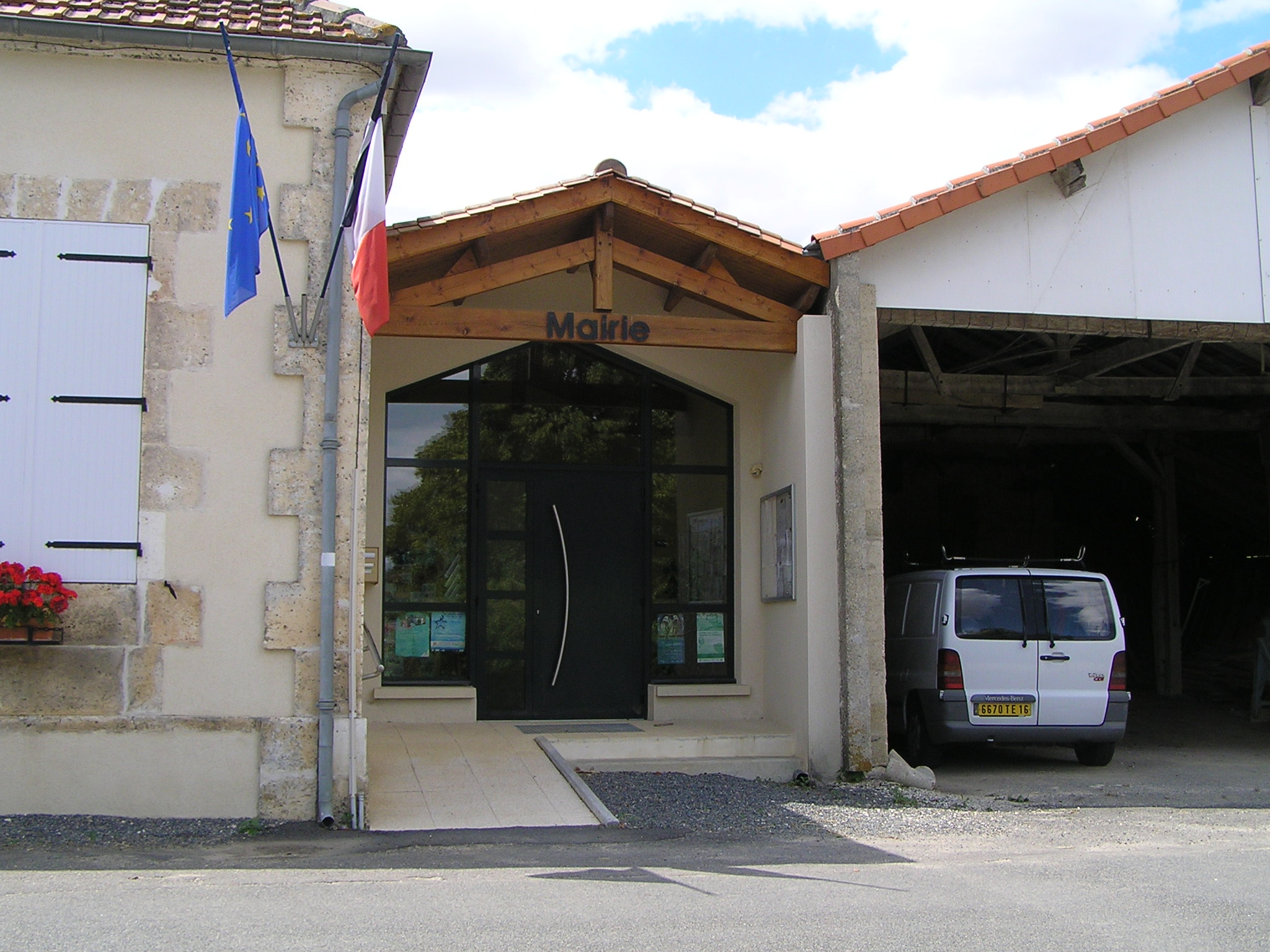 mairie de Montigné